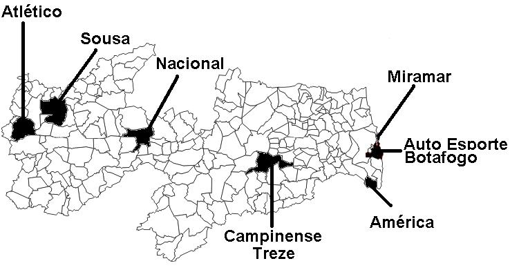 Origem dos times que participam do Campeonato Paraibano de 2004